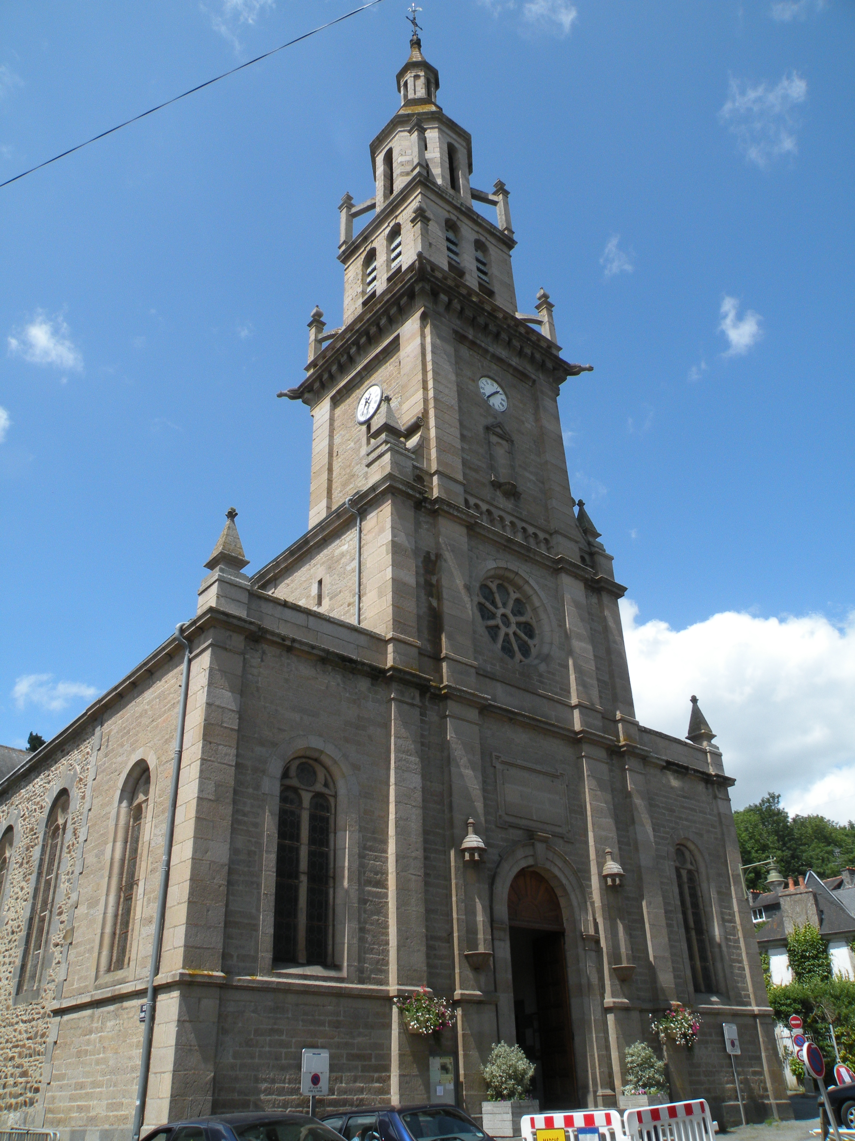 L'église Notre-Dame-de-Bon-Voyage à Binic.